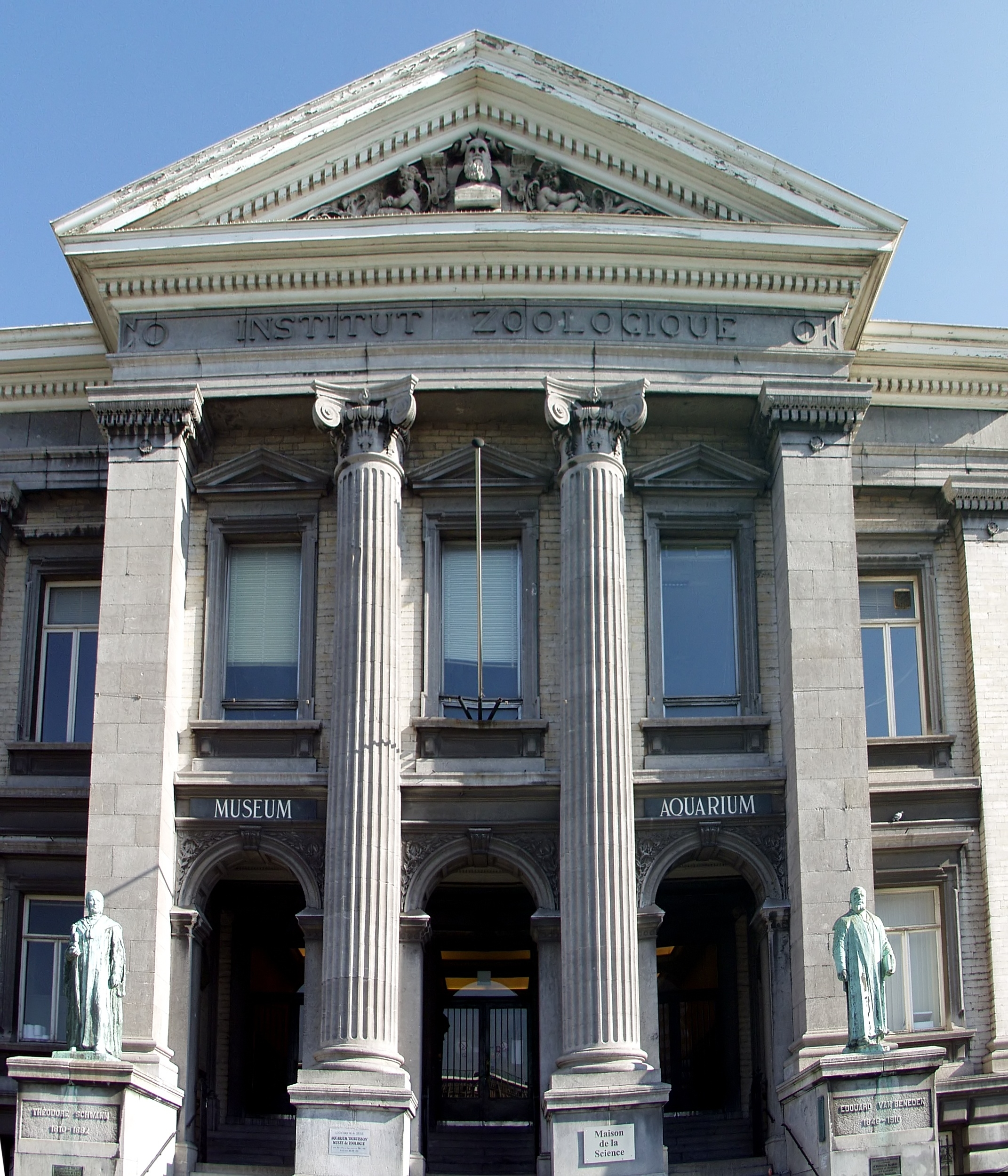 Aquarium et musée de zoologie. Liège, Belgium